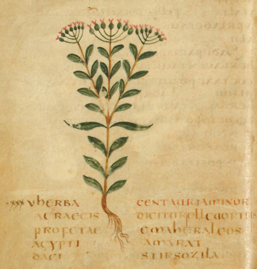 Abbildung von Centauria minor